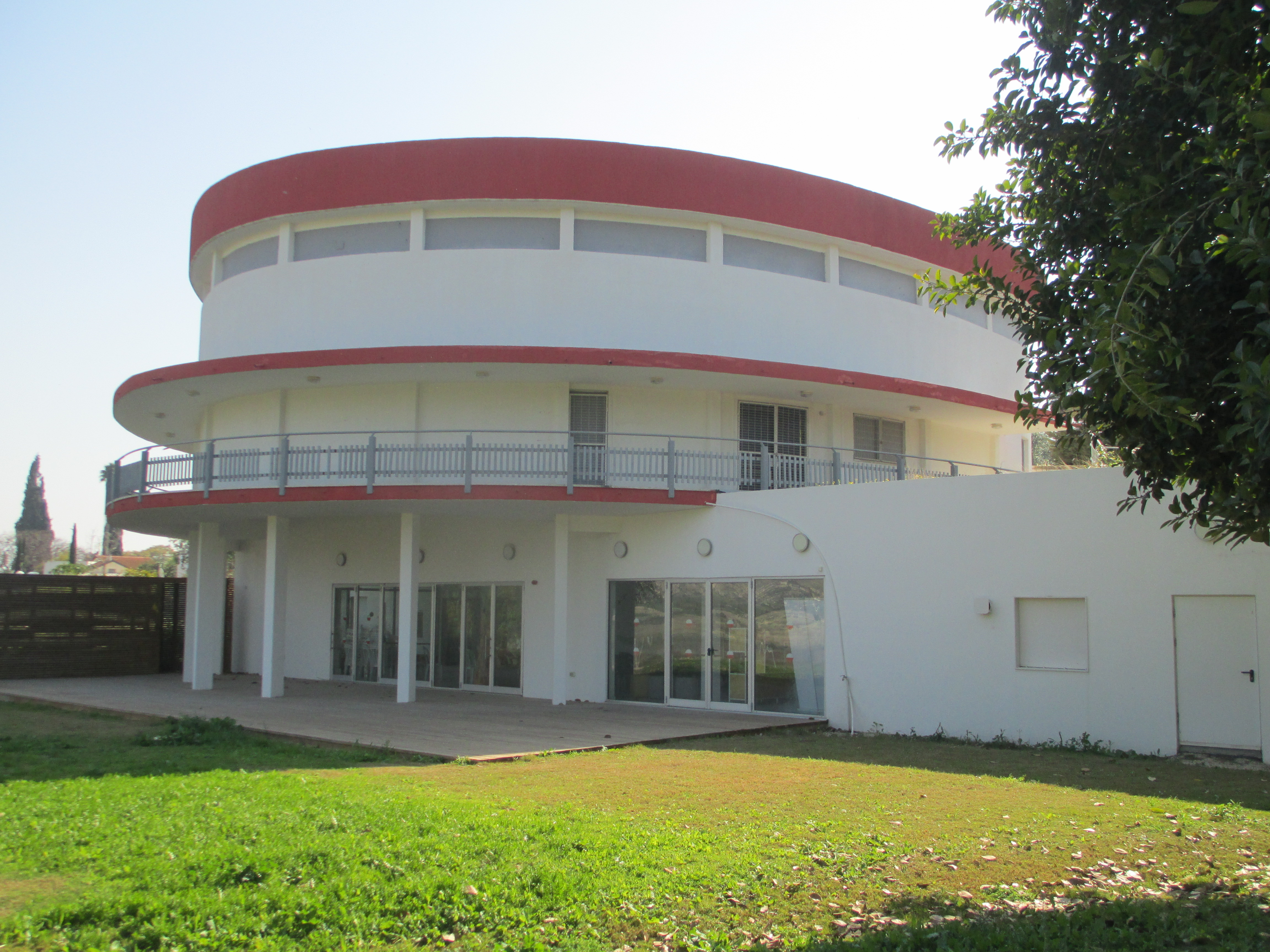 בית רופין המשופץ בכפר רופין - מרכז מבקרים לצפרות